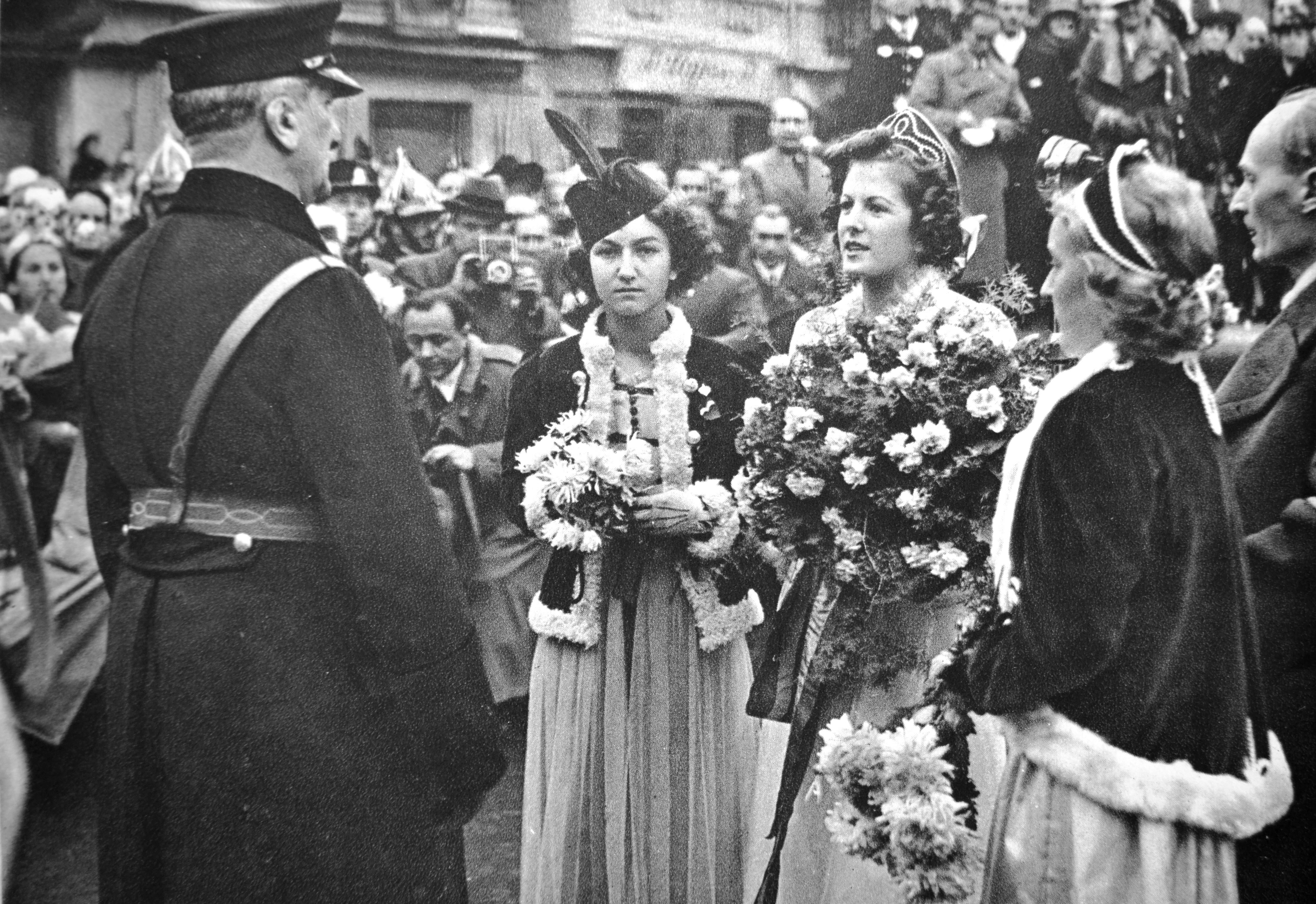 Maďarskú hlavu štátu Miklósa Horthyho vítajú komárenské dievčatá (november 1938)